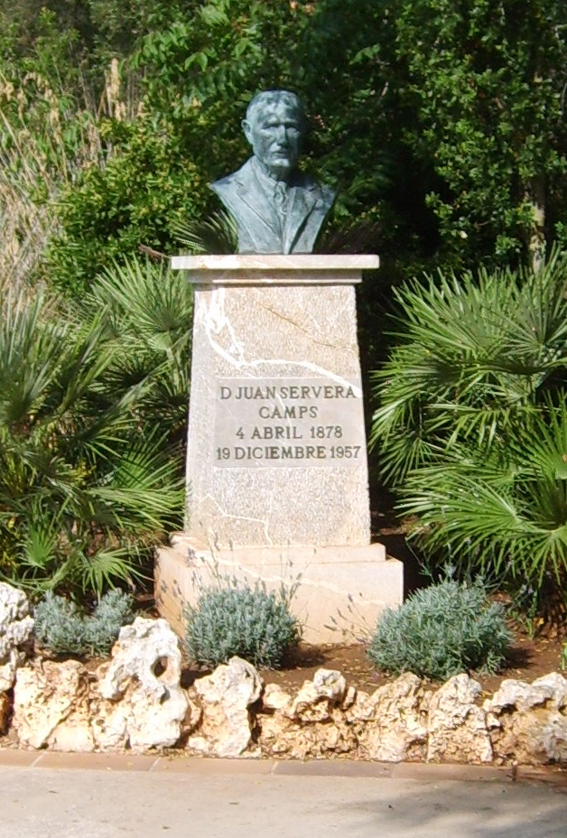 Denkmal, Juan Servera, Portocristo, Mallorca